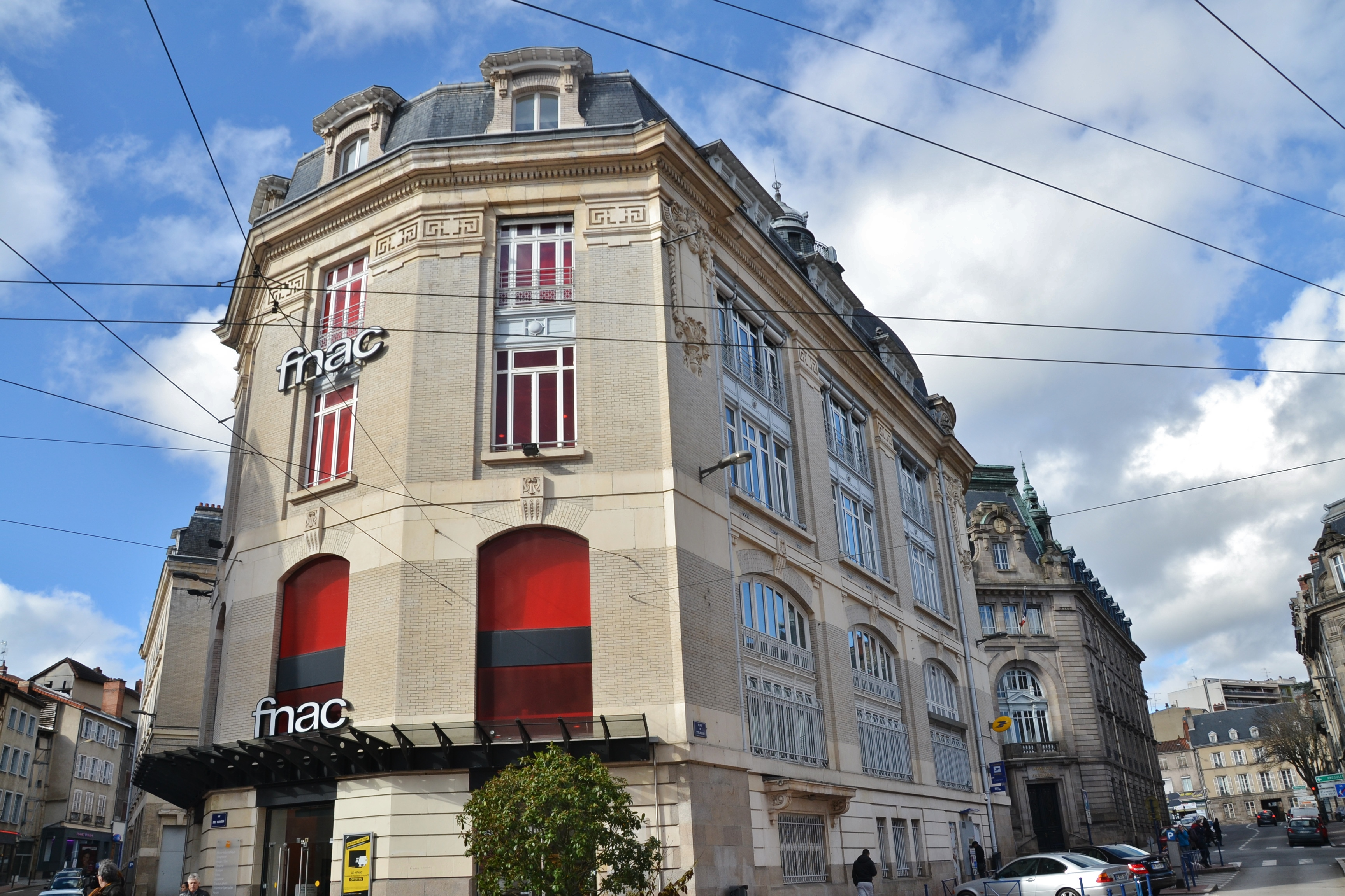 Le bâtiment de l'ancienne poste centrale de Limoges (Haute-Vienne, France).